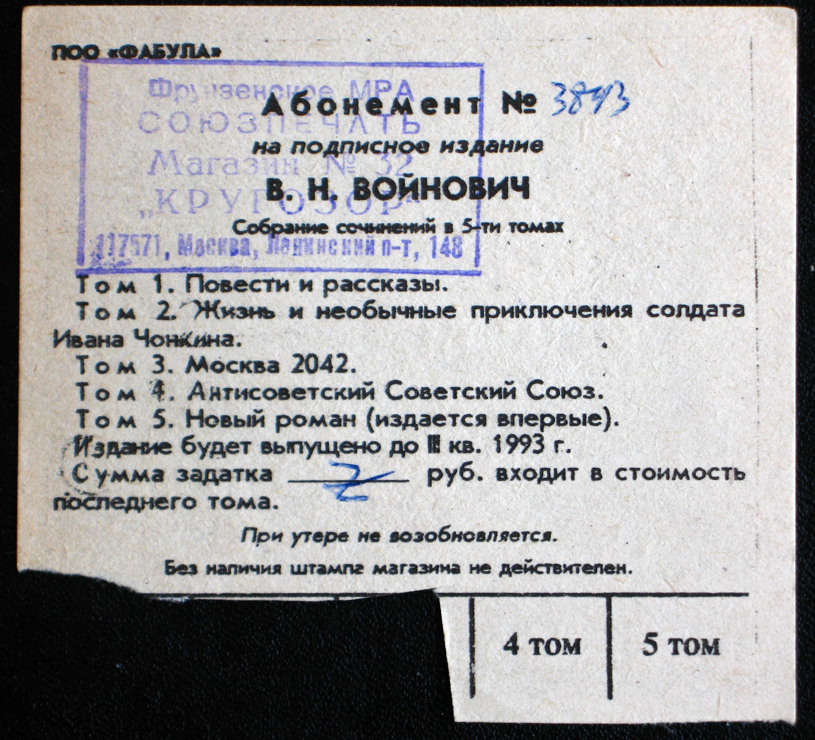 Vladimir Voinovich abonement. Фрунзенское Межрайонное агентство (МРА) "Союзпечать". Магазин № 32 "Кругозор". Москва, Ленинский проспект, 148. Подписной абонемент на собрание сочинений [эмигранта] Владимира Войновича в 5 томах с вырезанными купонами полученных 1-3 томов.